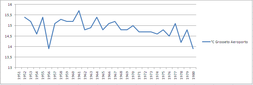 Stazione meteorologica di Grosseto Aeroporto: andamento della temperatura media annua dal 1951 al 1980